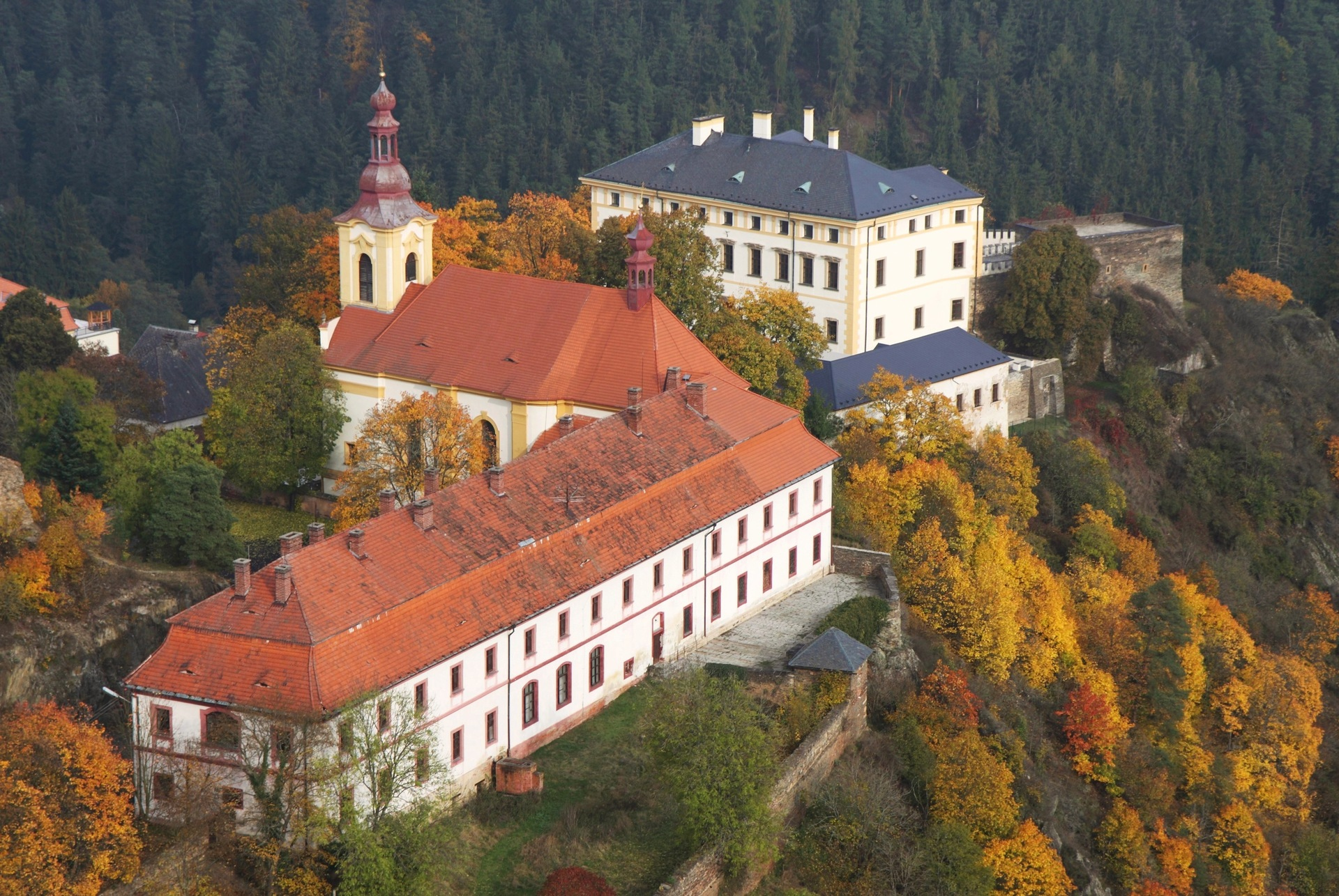 Pohled z nebe na Rabštejn nad Střelou